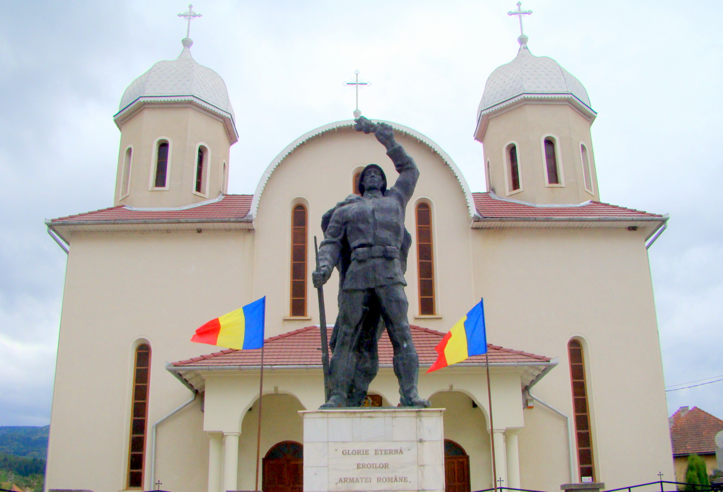 Statuia ostașului român oraș Covasna Piața Eroilor, Voinești